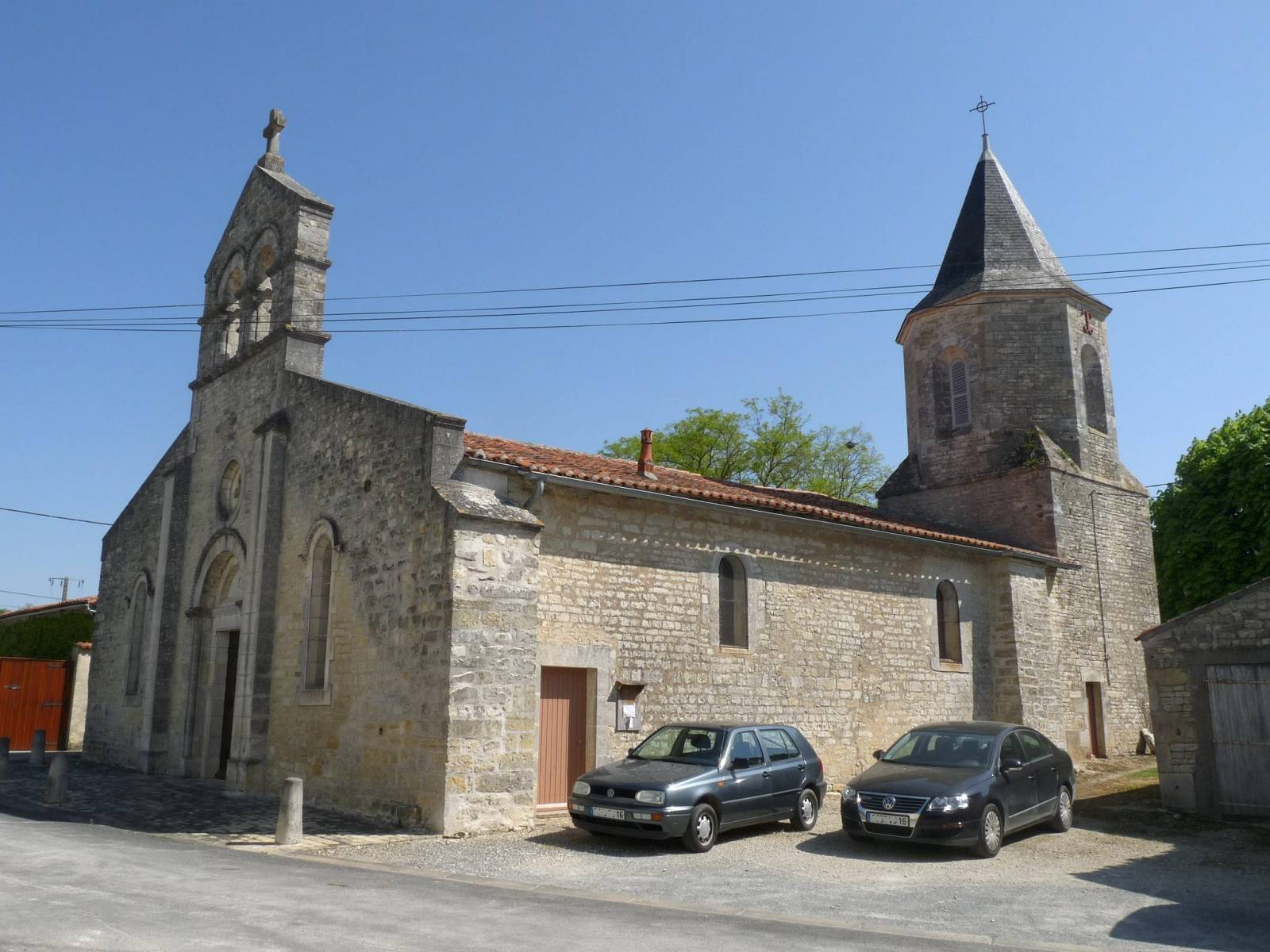 église de Fouqueure, Charente, France